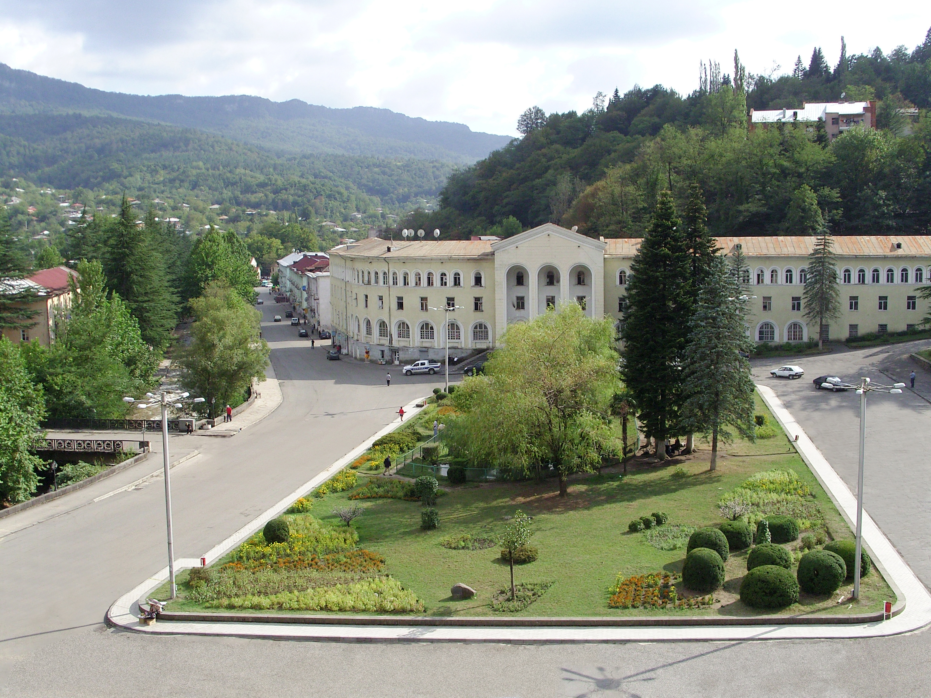 ქალაქ ტყიბულის ცენტრალური ნაწილი. კარლო ლომაძის მოედანი.